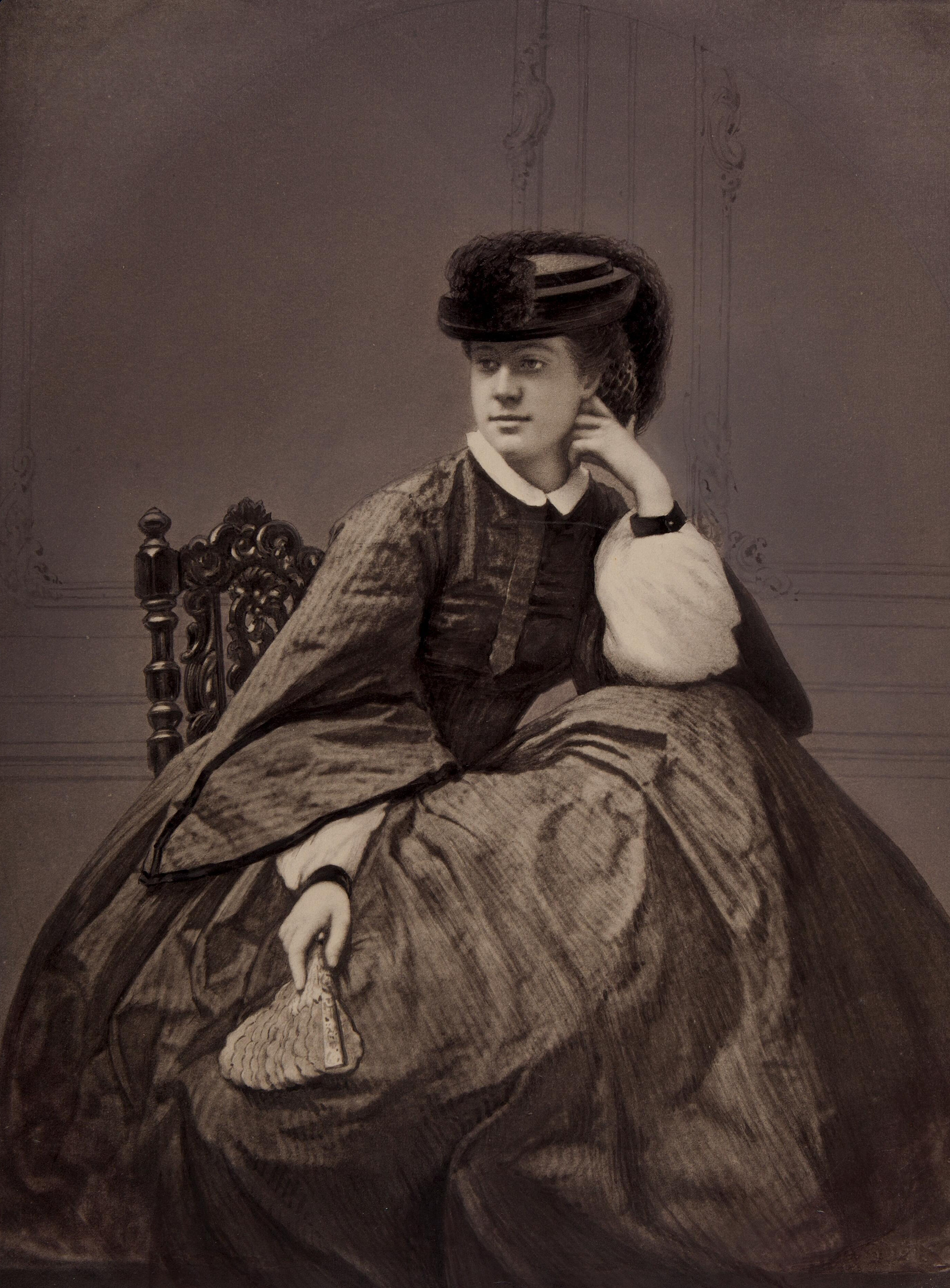 Alexandrine Tinne (1835-1869). Circa 1855-1860 gefotografeerd door Robert Jefferson Bingham (1825-1875), Parijs; reproductie uit 1874 door Maurits Verveer (1817-1903), Den Haag.